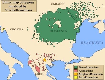 Romanians-map1